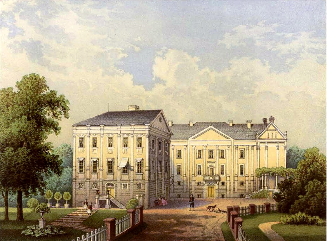 Schloss Filehne, Kreis Czarnikau, Provinz Posen, Lithografie aus dem 19. Jahrhundert